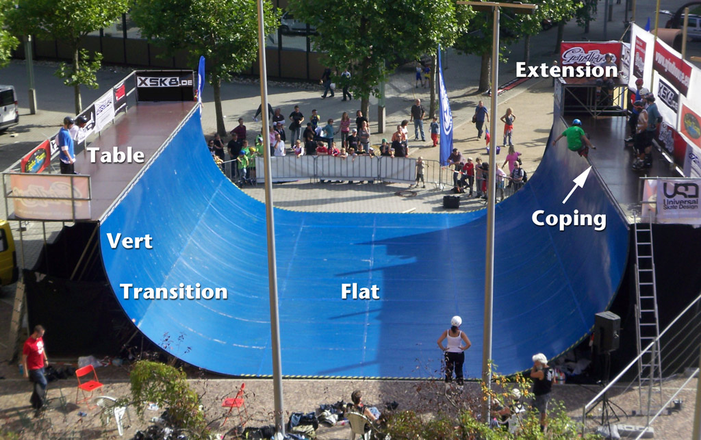 Halfpipe mit Beschriftung der Komponenten